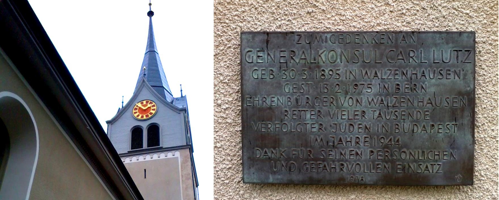 A walzenhauseni templom és az oldalán található Lutz emléktábla, Svájc